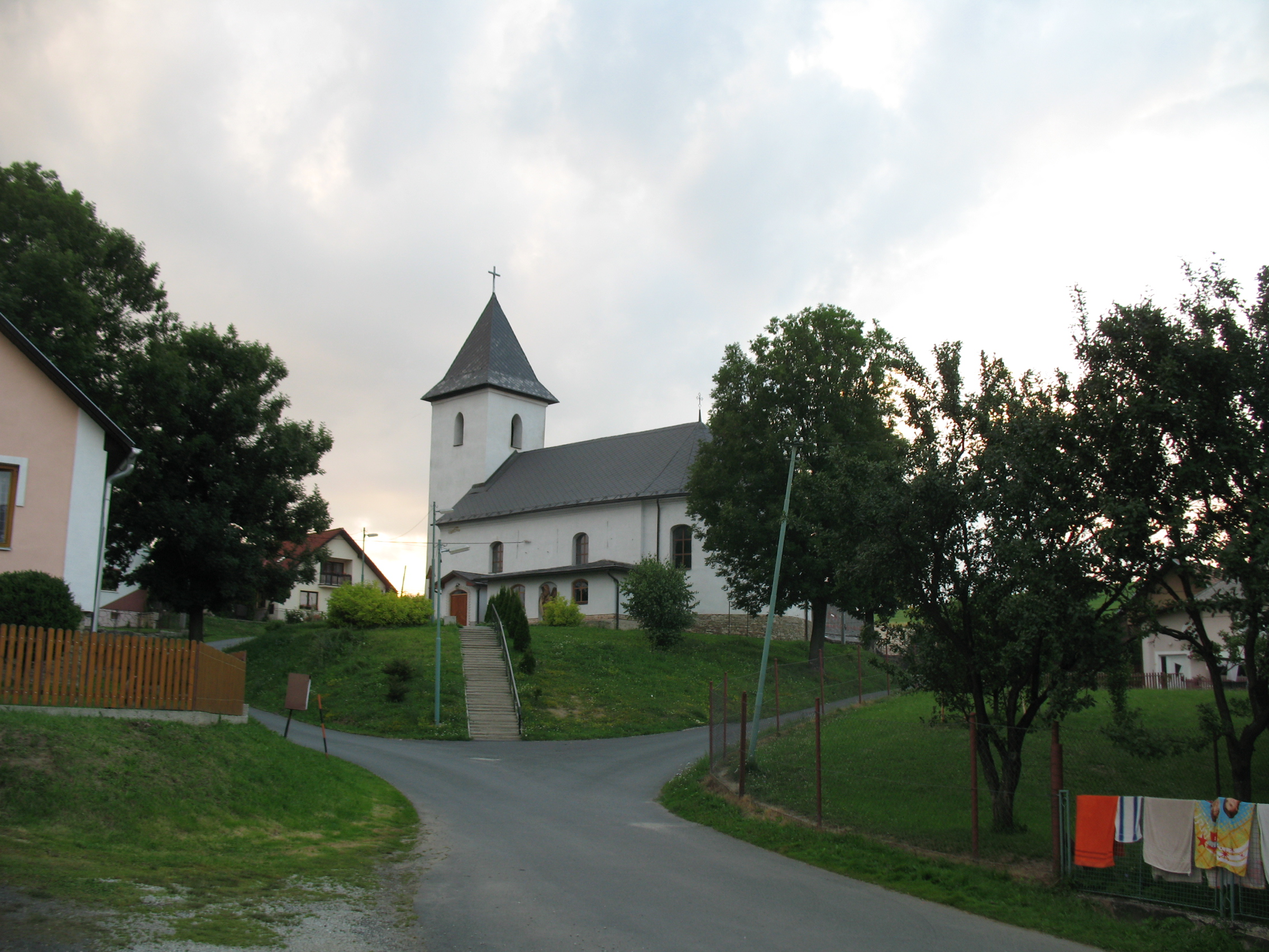 Lándzsásötfalu Szt András